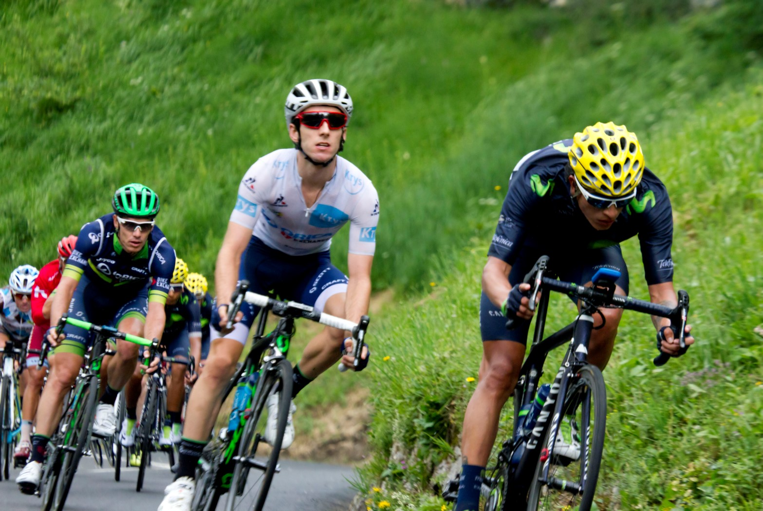 9245 yates